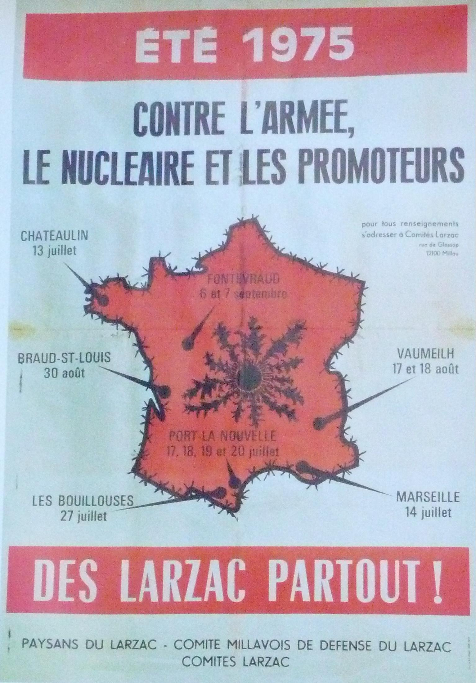 "Lutte du Larzac" : "Des Larzac partout !" (photographie partielle d'une affiche commémorative de l'APAL pour l'anniversaire de la victoire 1981_2011)